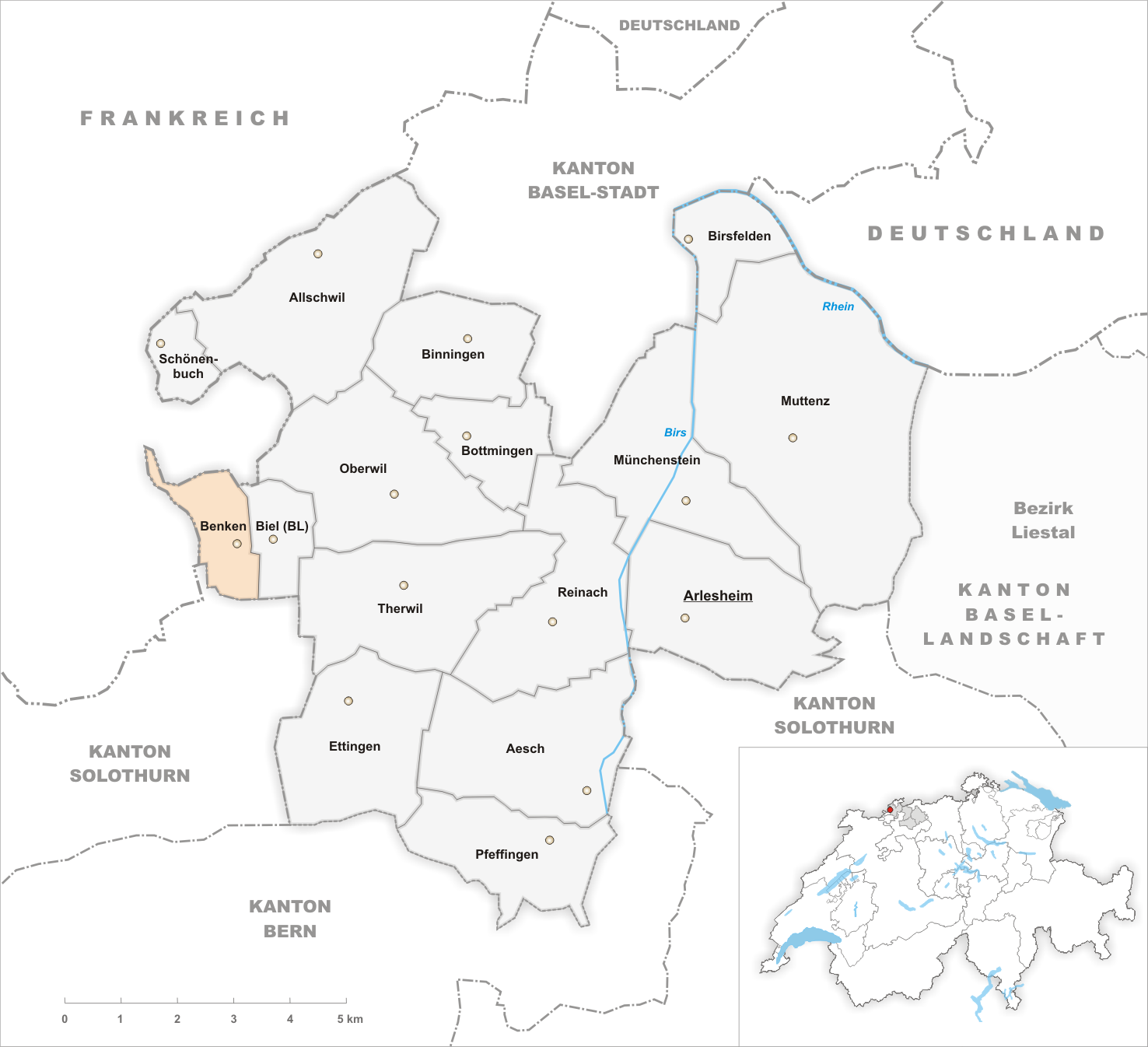 Municipality Benken Artist: Tschubby